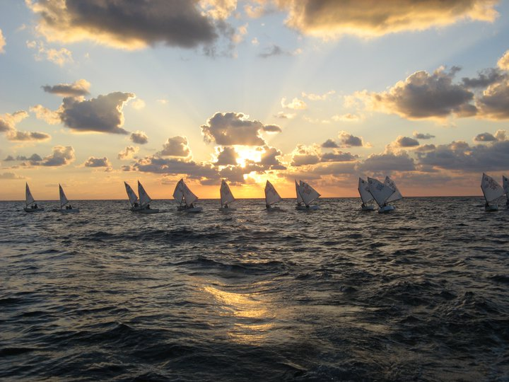 אופטימיסטים באימון חורף